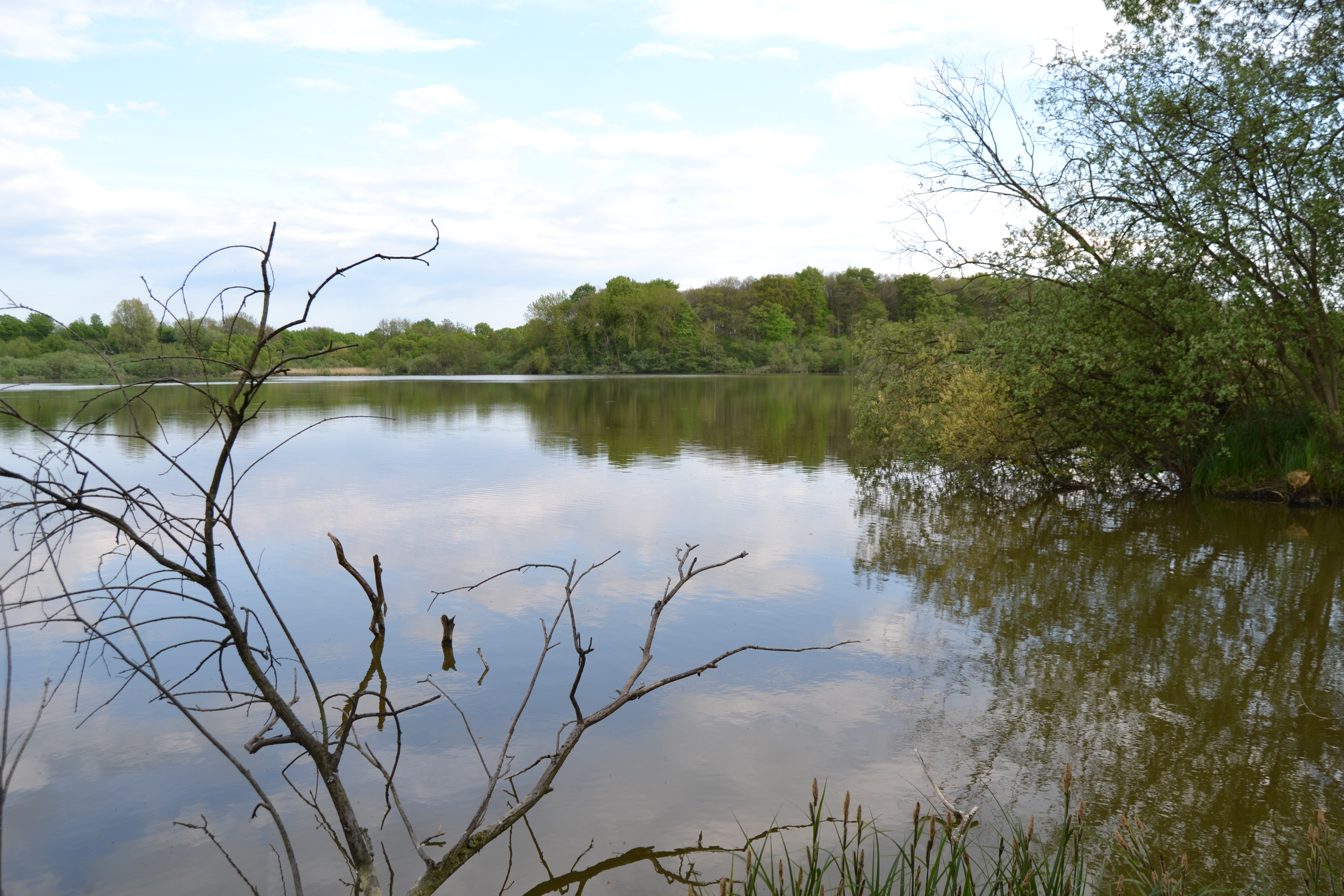 Dannauer See von NW im NSG Dannauer See und Umgebung, Gemeinde Rantzau, Kreis Plön